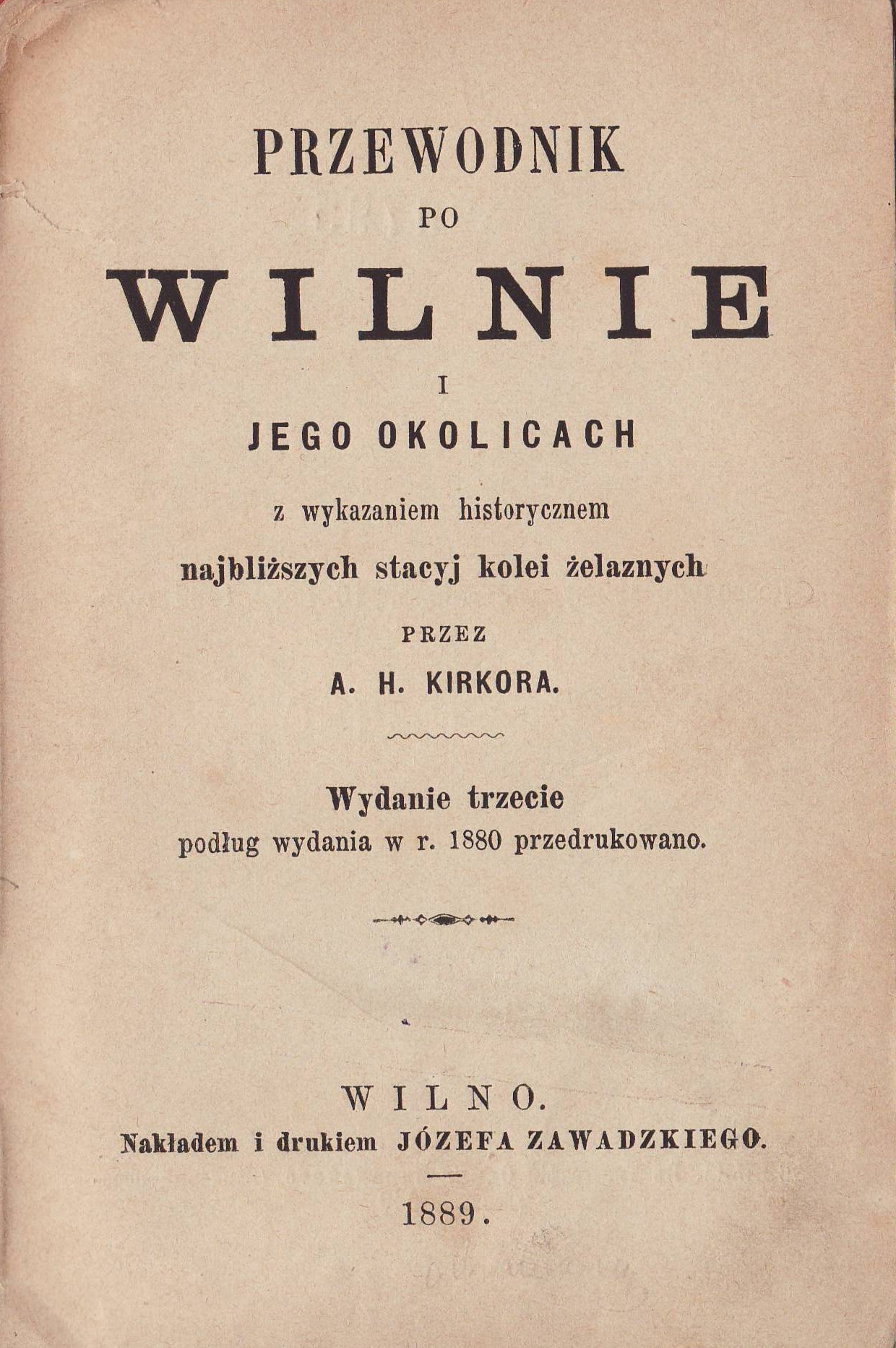 Przewodnik po Wilnie i jego okolicach z wykazaniem najbliższych stacyj kolei żelaznych przez A. H. Kirkora. Wydanie trzecie podług wydania w r. 1889 przedrukowano. Wilno: Nakładem i drukiem Józefa Zawadskiego, 1889. Title page